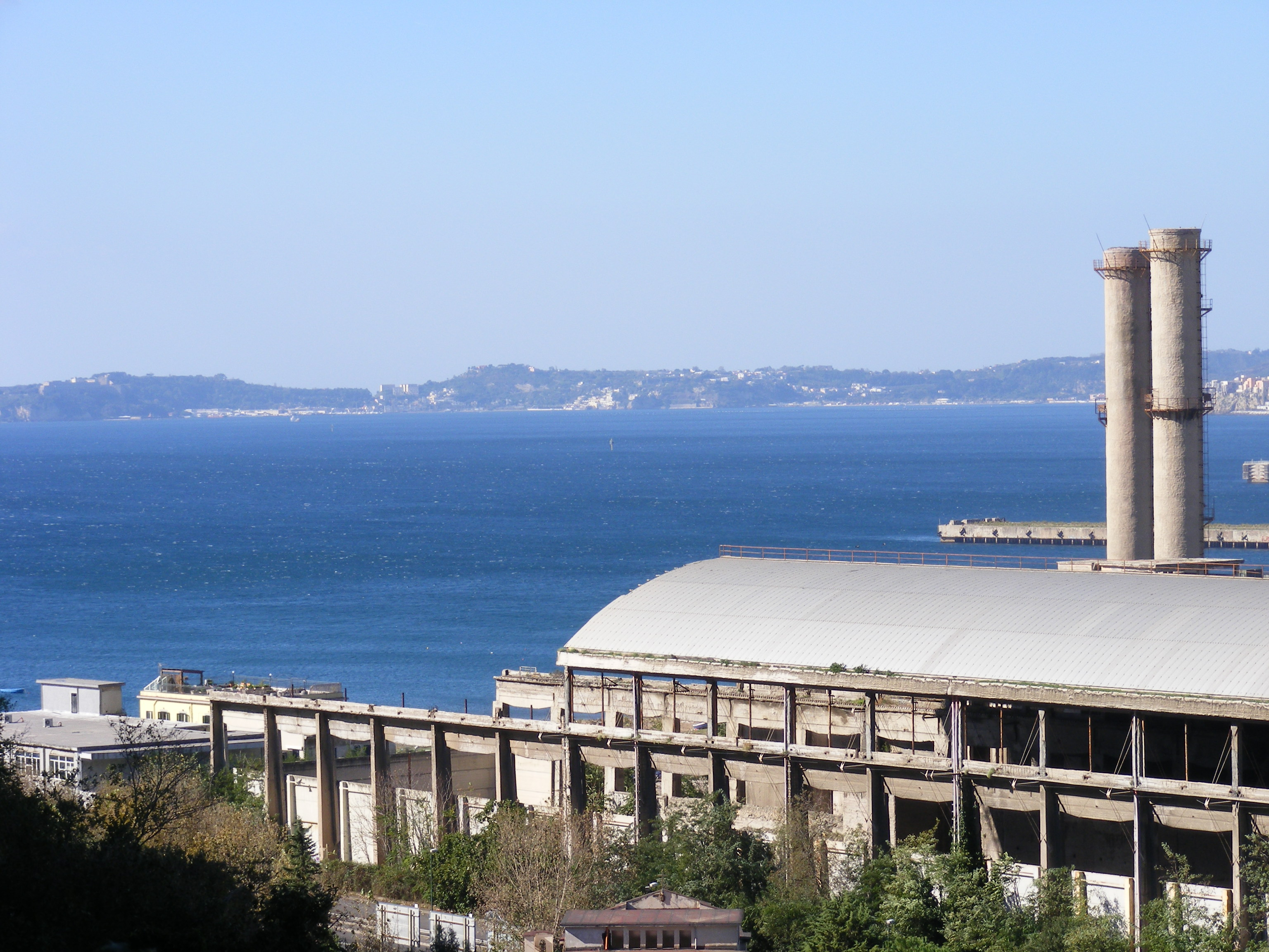 Napoli Bagnoli derelict steelworks